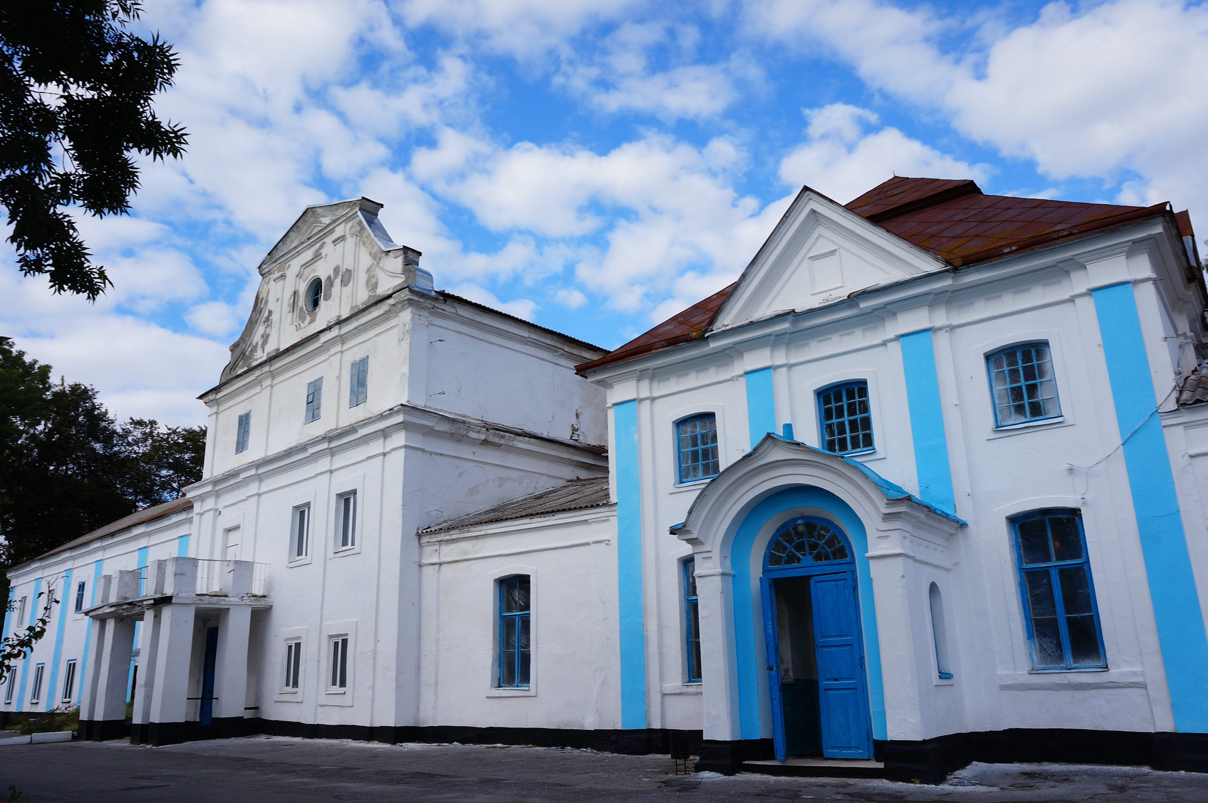 Герогіївський василіанський монастир (мур.):, смт.Любар